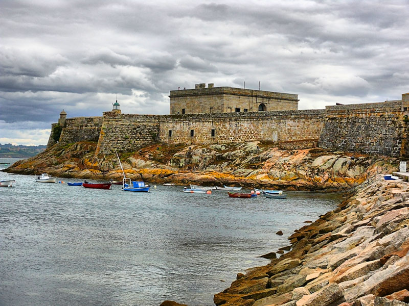 Castelo de Santo Antón